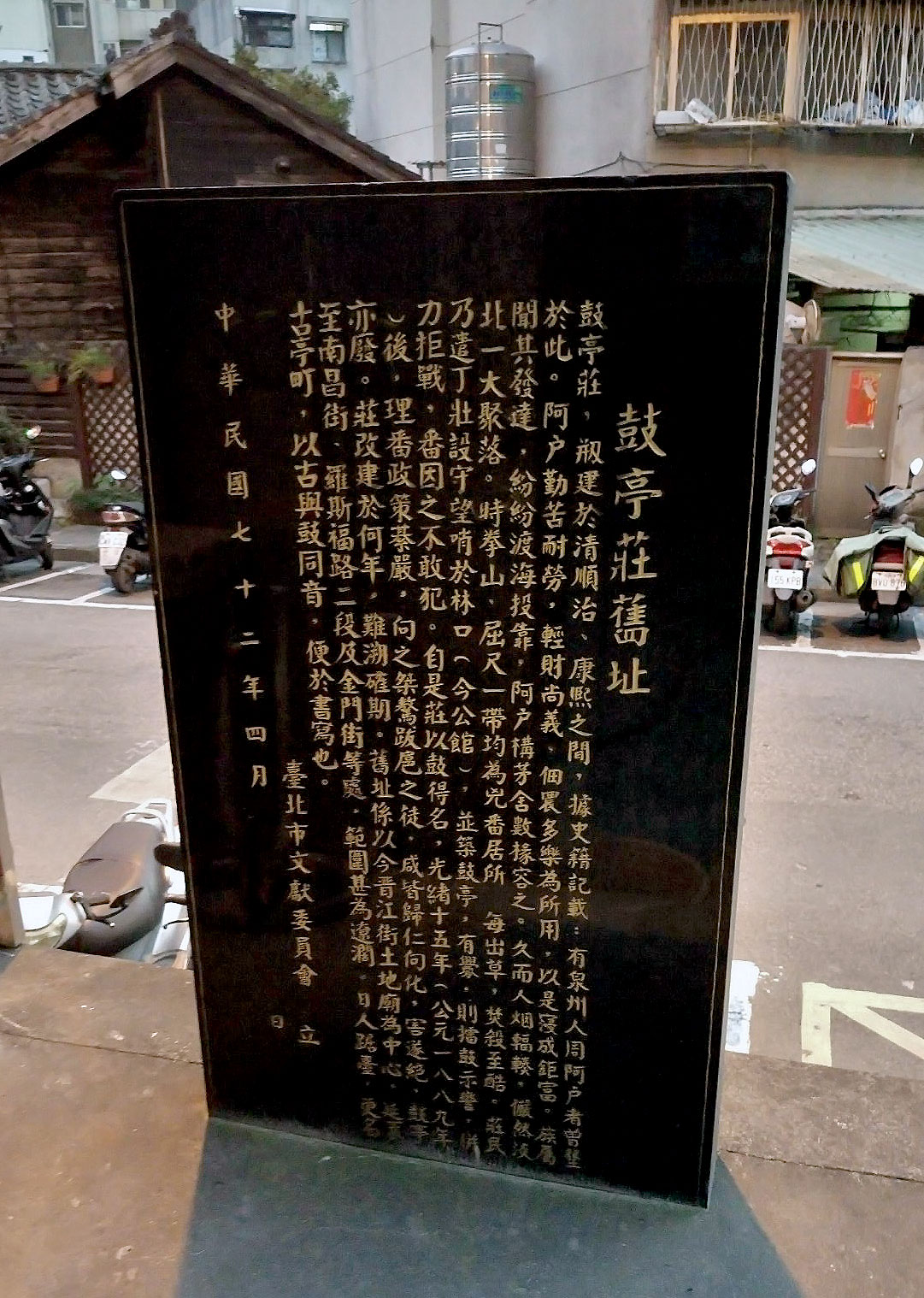 中文（台灣）: 鼓亭莊舊址石碑背面，1983年（中華民國72年）4月臺北市文獻委員會立。述鼓亭莊地區聚落形成始末，及「鼓亭」、「古亭」地名來由。